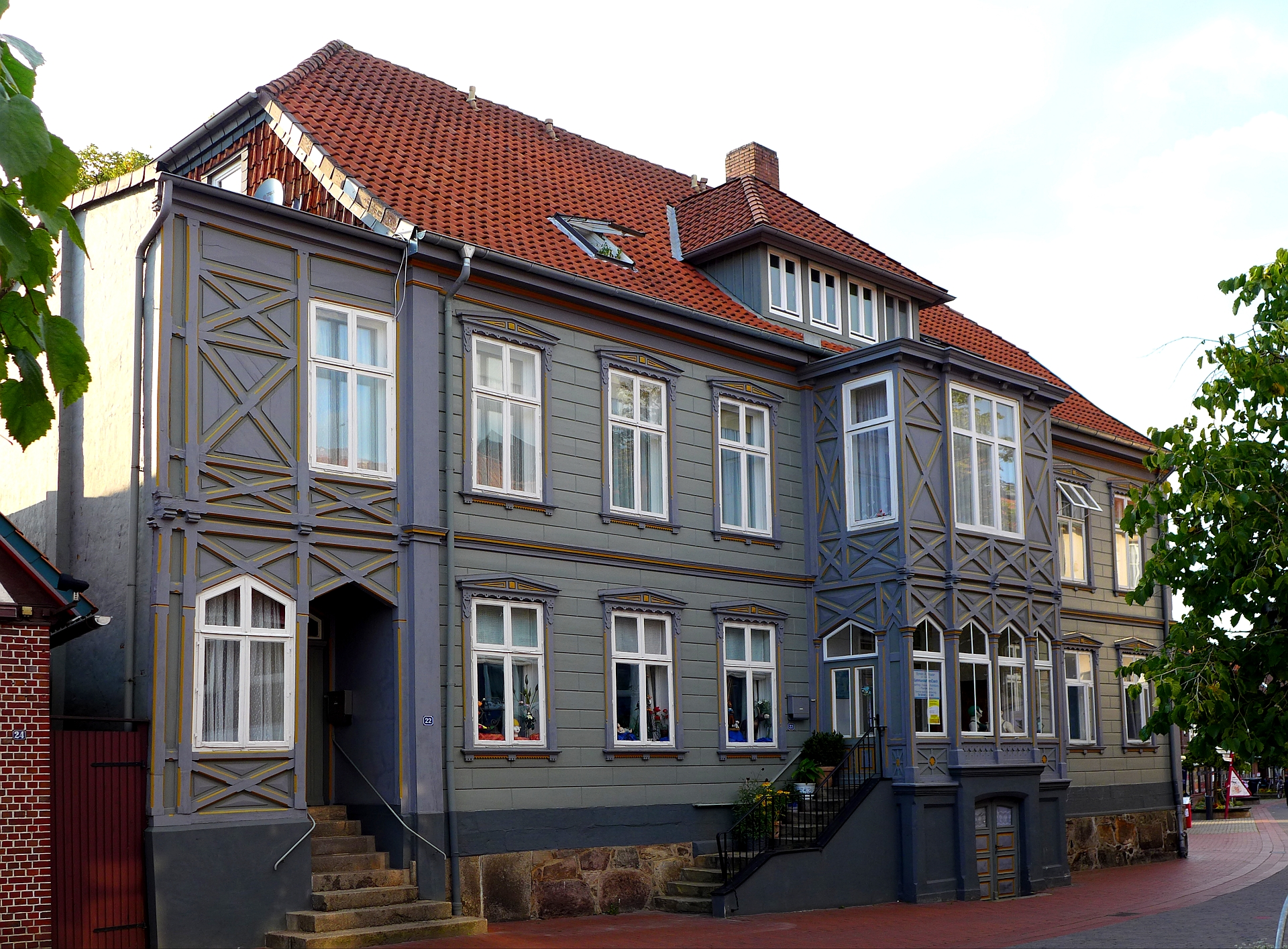 Ehemalige Amtsvogtei aus dem Jahre 1861. Baudenkmal in der Marktstraße 22, Soltau. Die Fassade ist aus Holz gefertigt. Gebäuderestaurierung 1988-1989. Aufnahmedatum 2015-09.